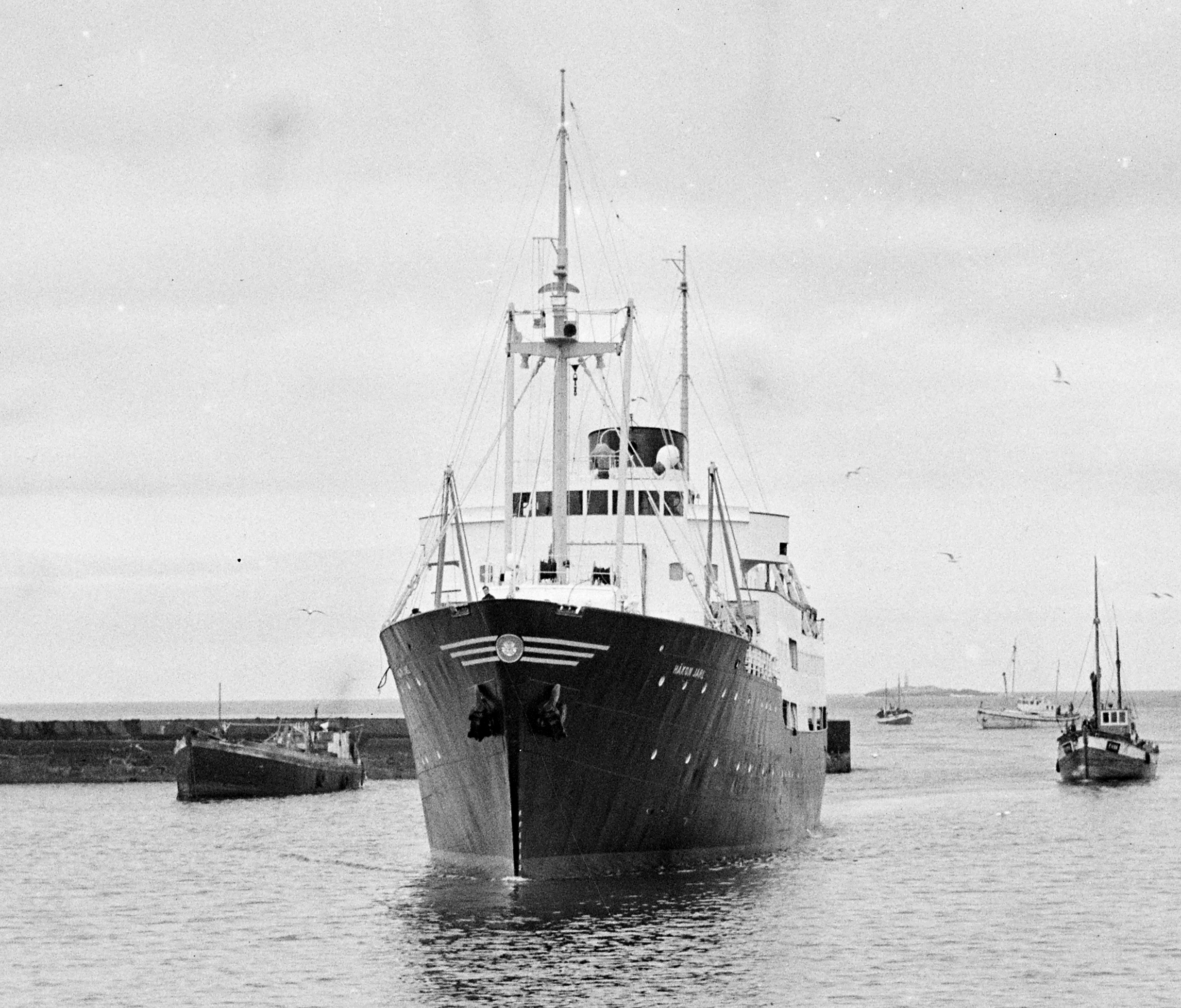 Hurtigruteskipet MS «Håkon Jarl» i Vardø under vårfisket i 1955.